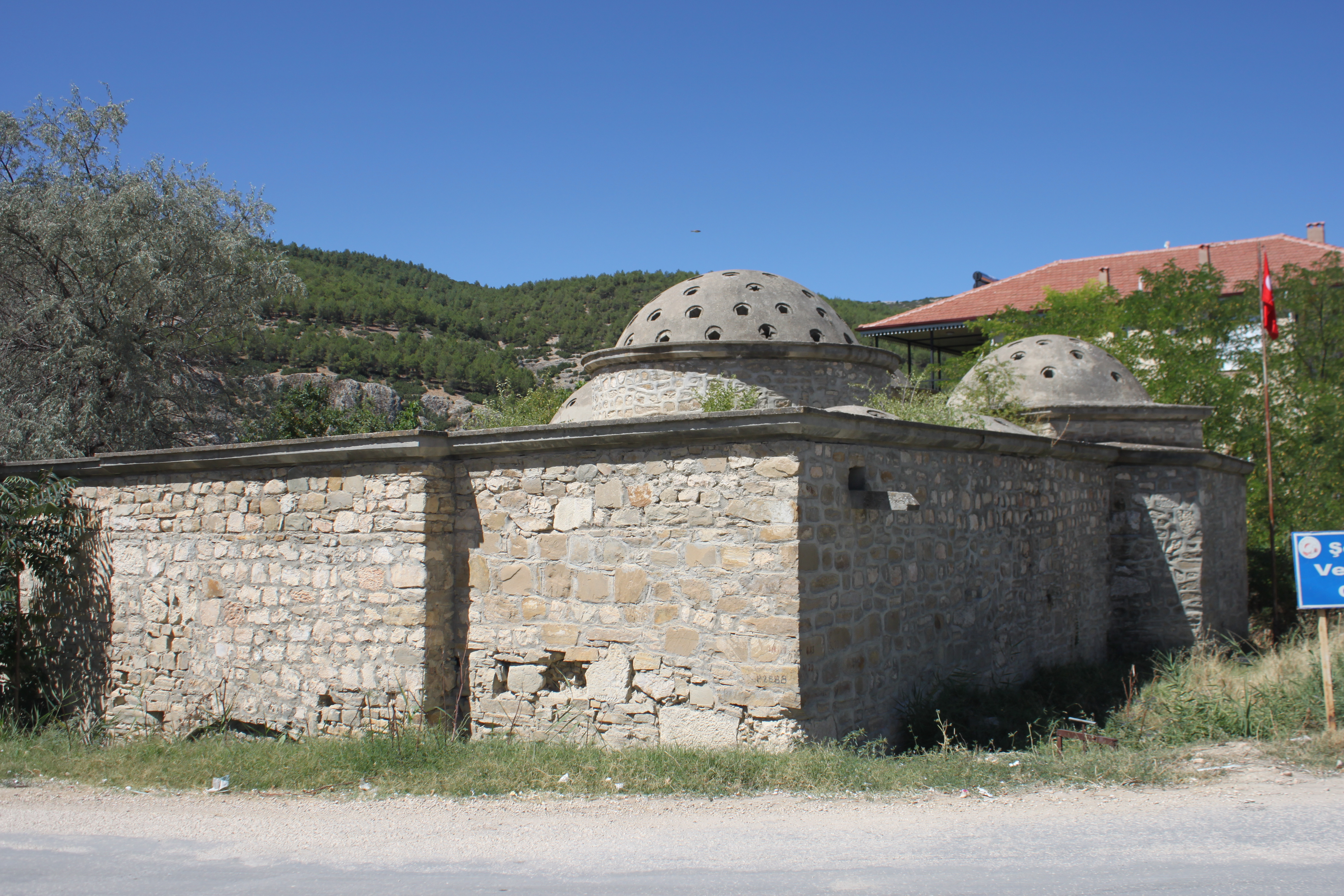 Dies ist der älteste Hamam in Korkuteli und zugleich eines der ältesten profanen Gebäude der Stadt.